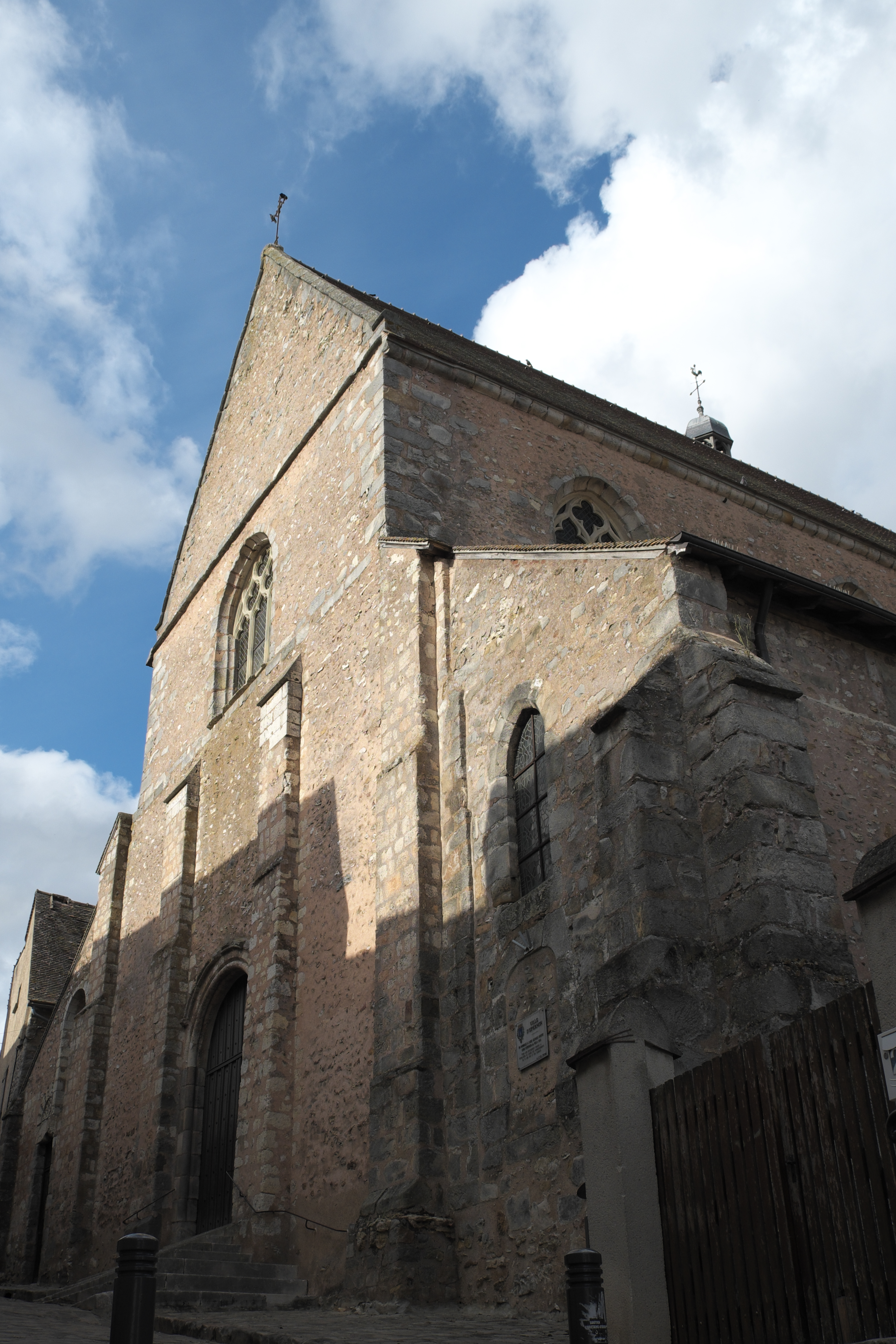 Katholische Kirche Saint-Pierre in Épernon im Département Eure-et-Loir (Centre-Val de Loire/Frankreich), Westfassade .